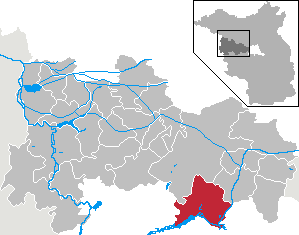 Ketzin/Havel in Brandenburg (Country) - District Havelland